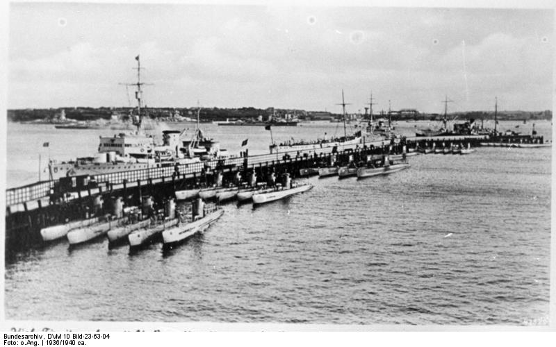 Kiel, Tirpitzmole mit U-Booten Kiel, Tirpitzmole mit U-Bootsflottillen und U-Boots-Mutterschiffen [Kiel.- Tirpitzmole mit Ubooten [Typ II und VII ?] und U-Boot Begleitschiffen, Tender]